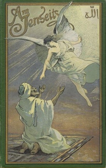 Buchdeckel des Romans Am Jenseits von Karl May